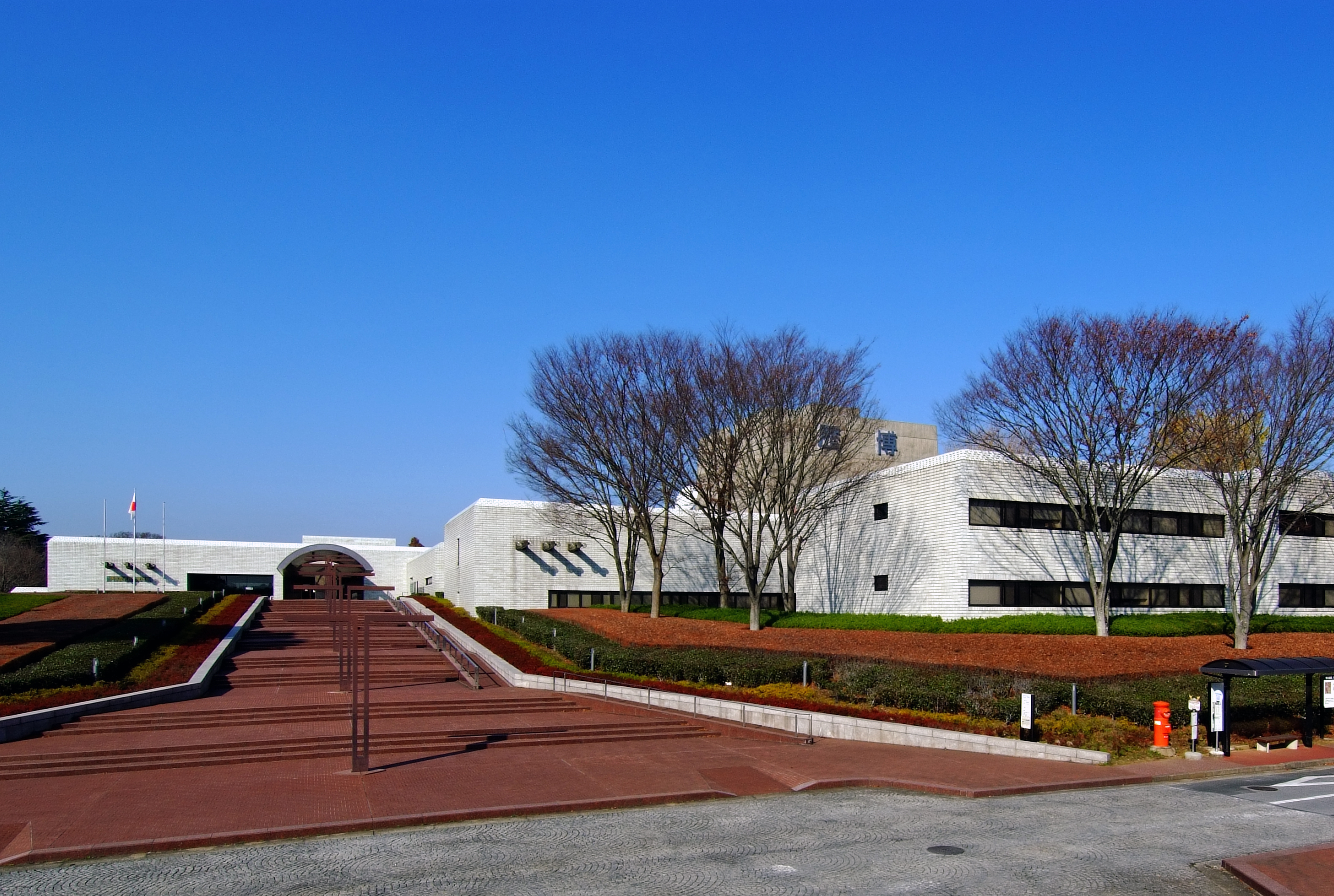 国立歴史民族学博物館、千葉県佐倉市、芦原義信設計、1980年。